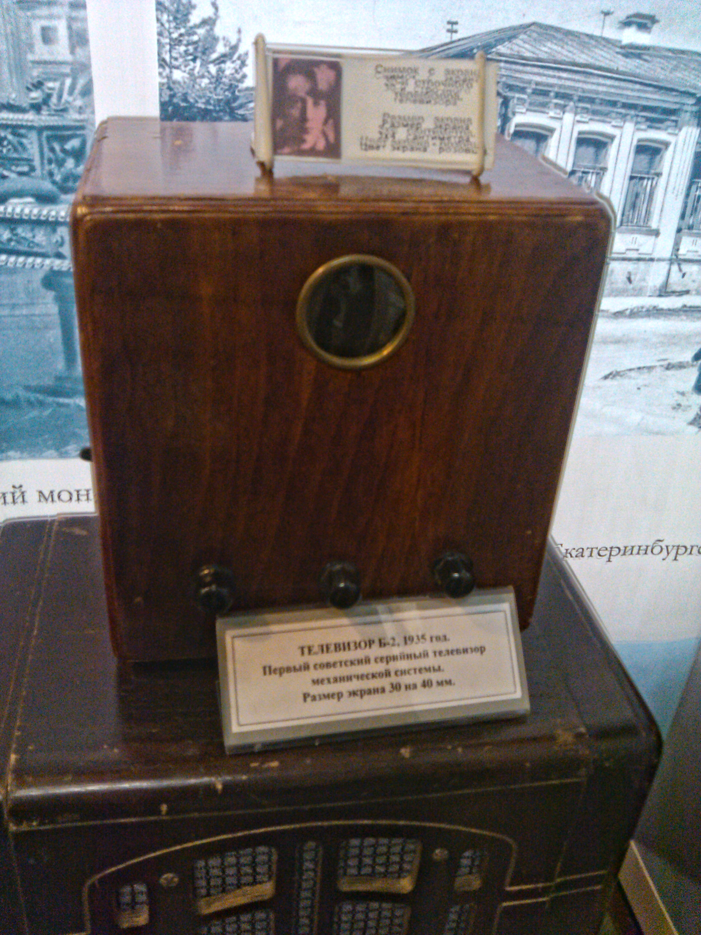 Телевизор Б-2 из Музея Радио Екатеринбурга